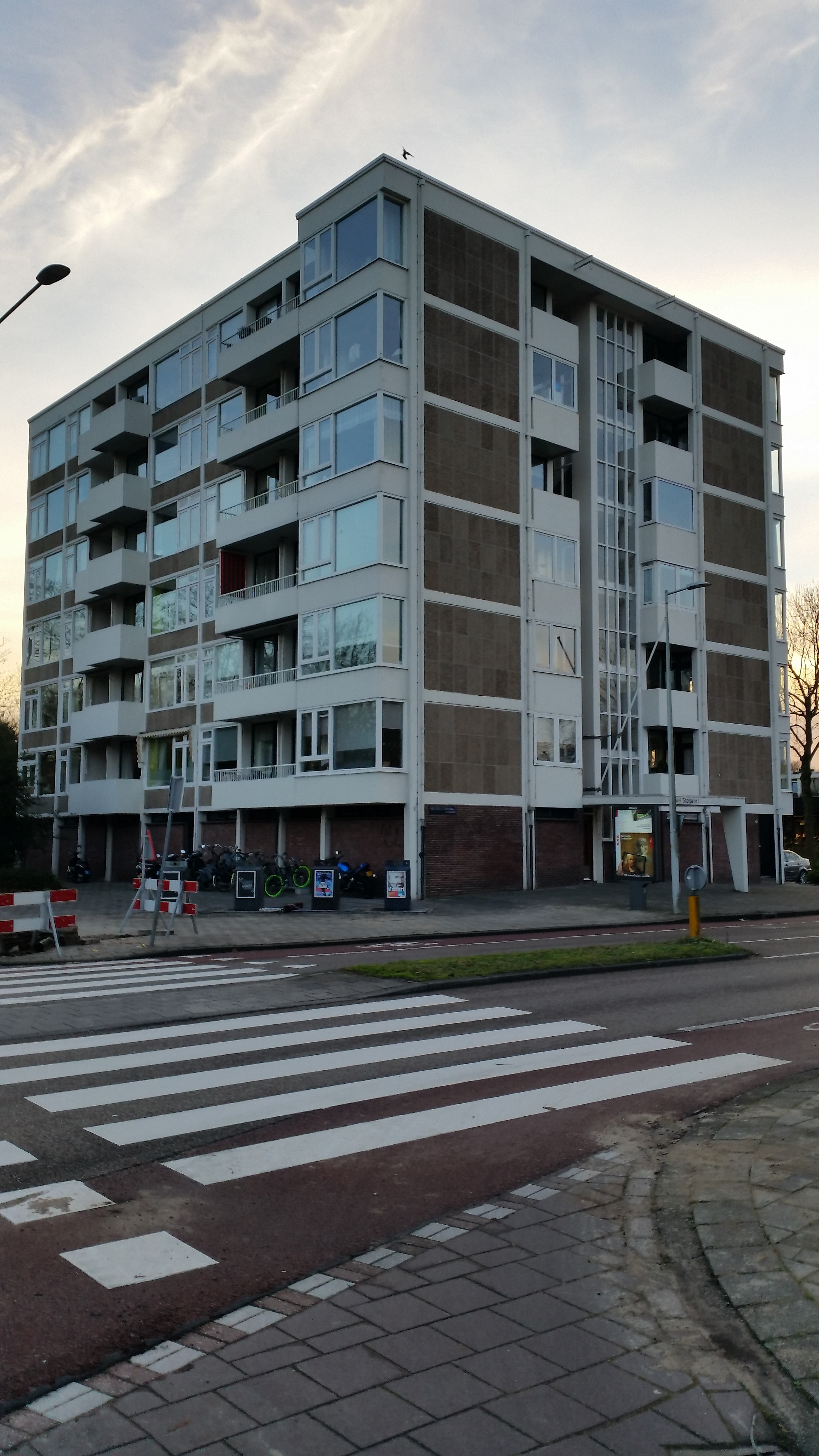 Flat Daniël Stalpaert aan de Van Boshuizenstraat 1-73, Buitenveldert, Amsterdam-Zuid. Architect Bernard Bijvoet.